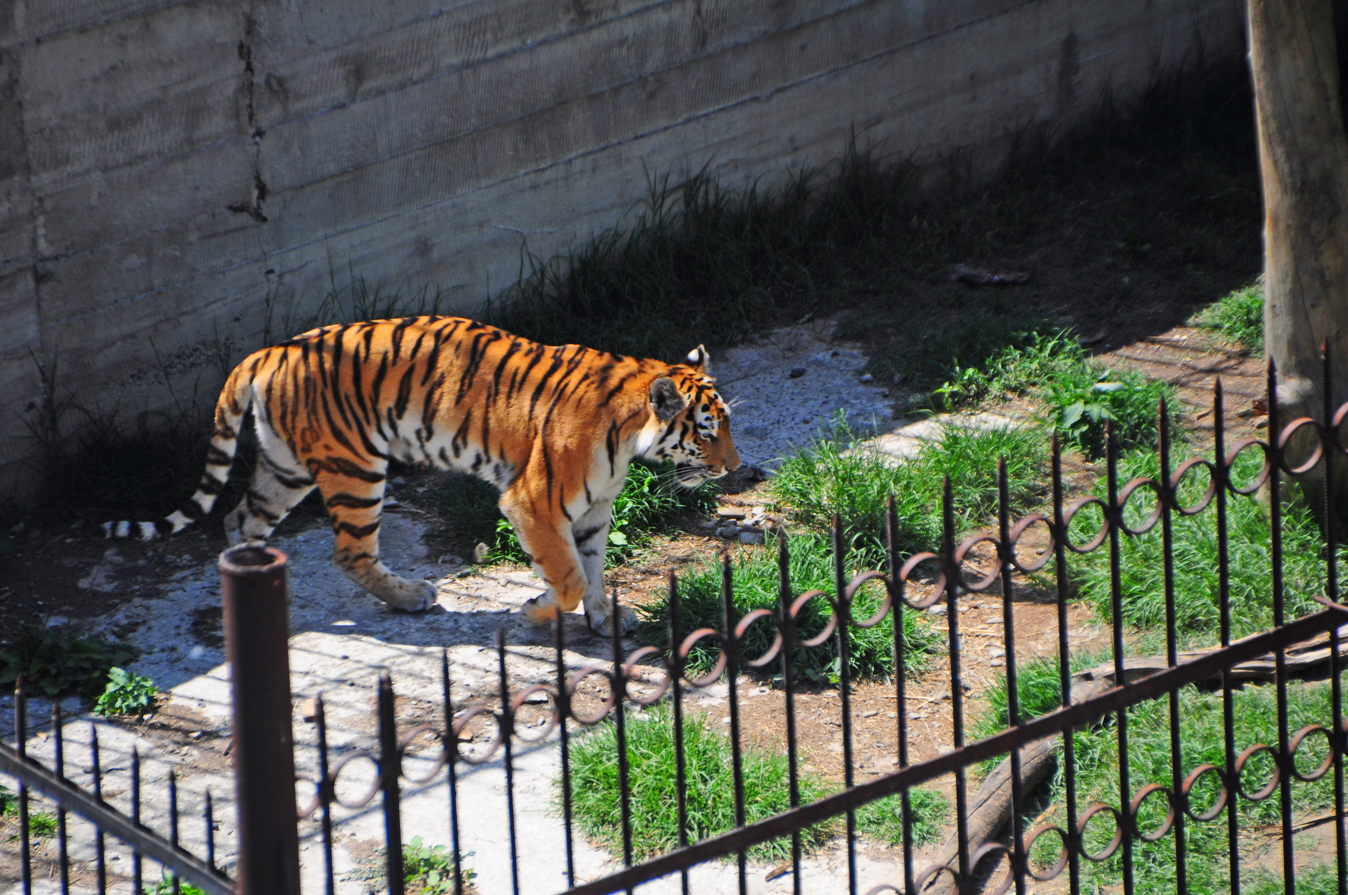 Tbilisi zoo tiger